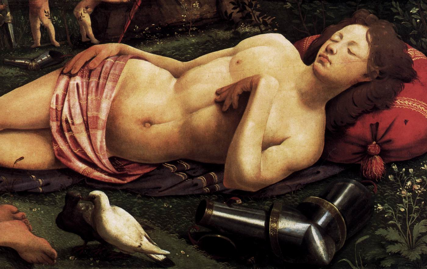 detail